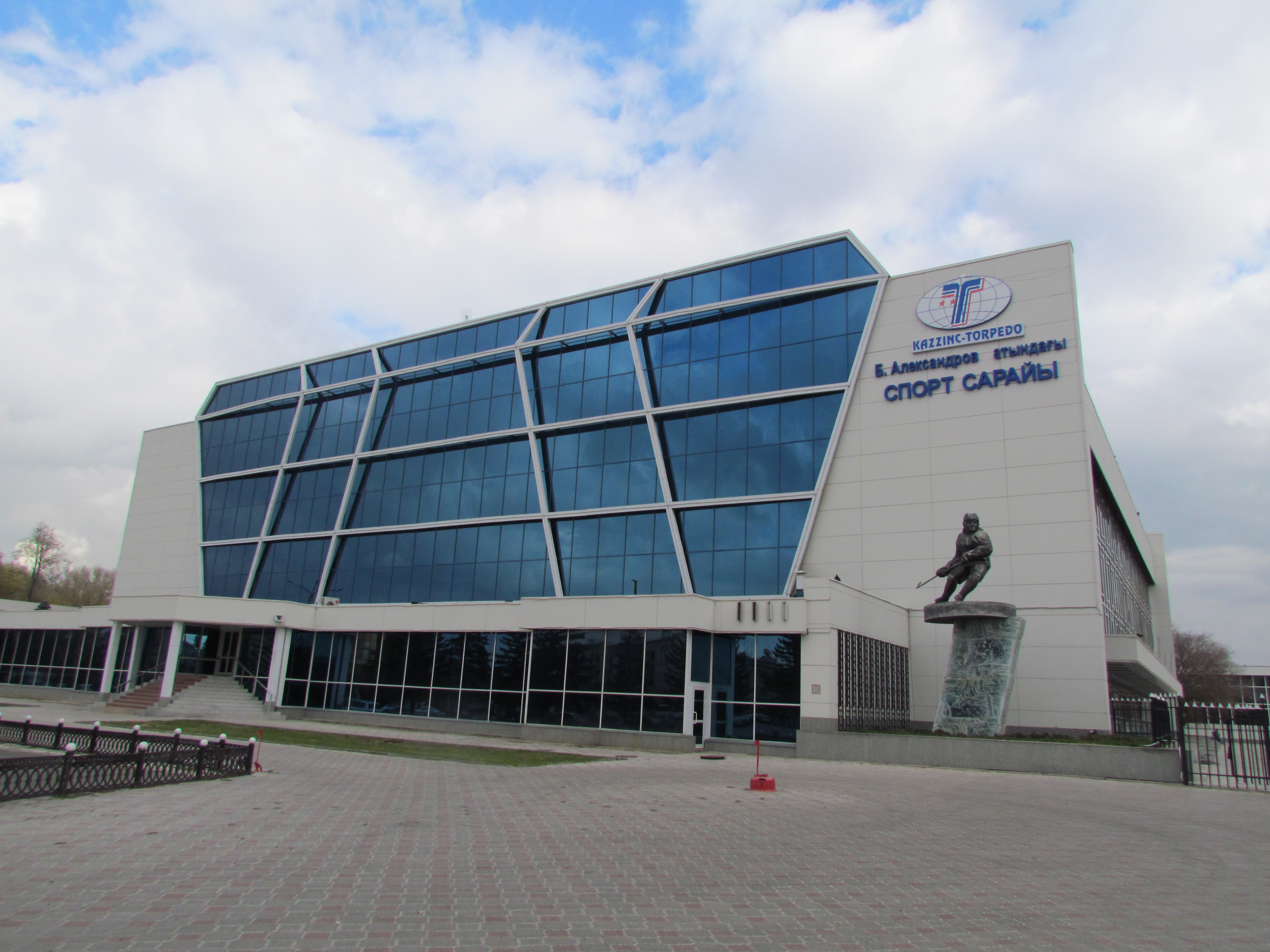 Дворец спорта имени Бориса Александрова, Усть-Каменогорск